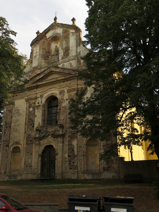 Kostel Nanebevzetí Panny Marie, Seč (okres Plzeň-jih).